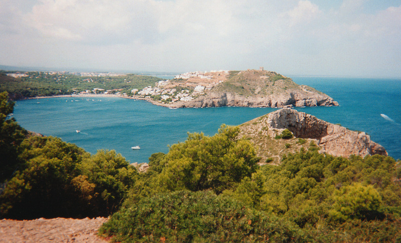 Cala Montgo am Montgri-Massiv